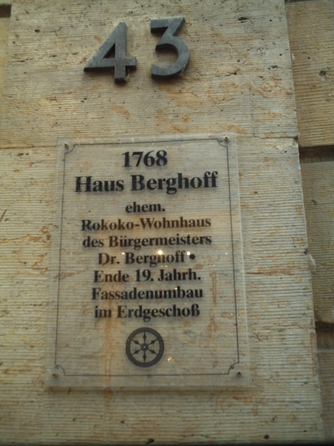 Gebäude Große Straße 43 in Osnabrück (Tafel)